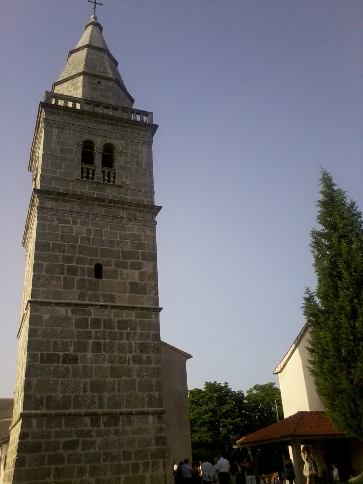 Zvonik i crkva (desno) u Poljicama na otoku Krku, Šotovento.